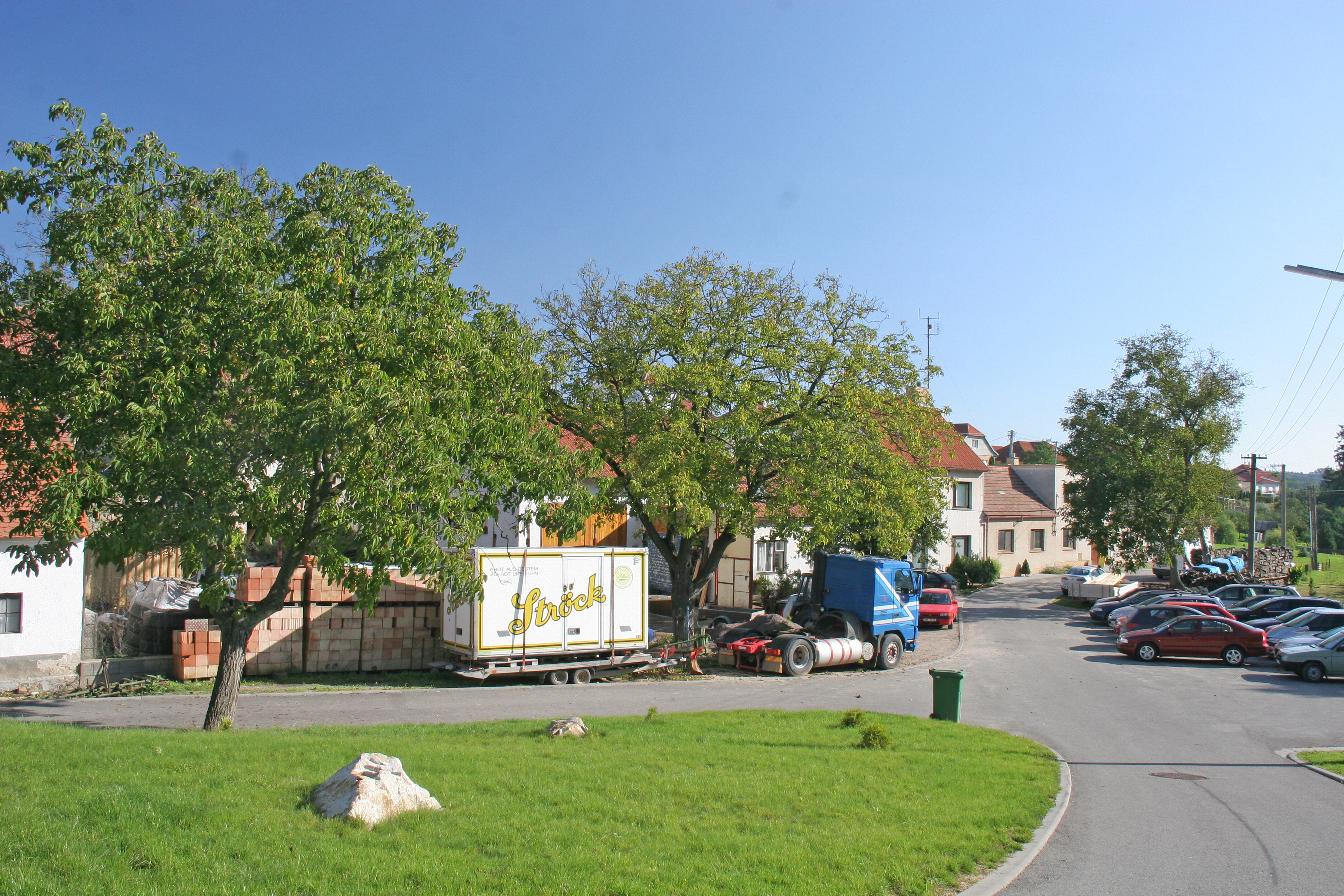 Mašovice